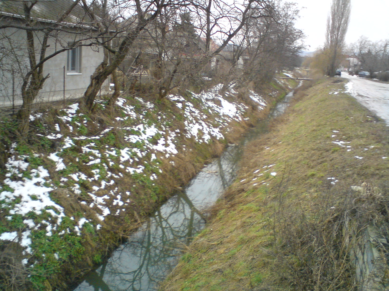 Sulák-patak Érdligeten (Érd)